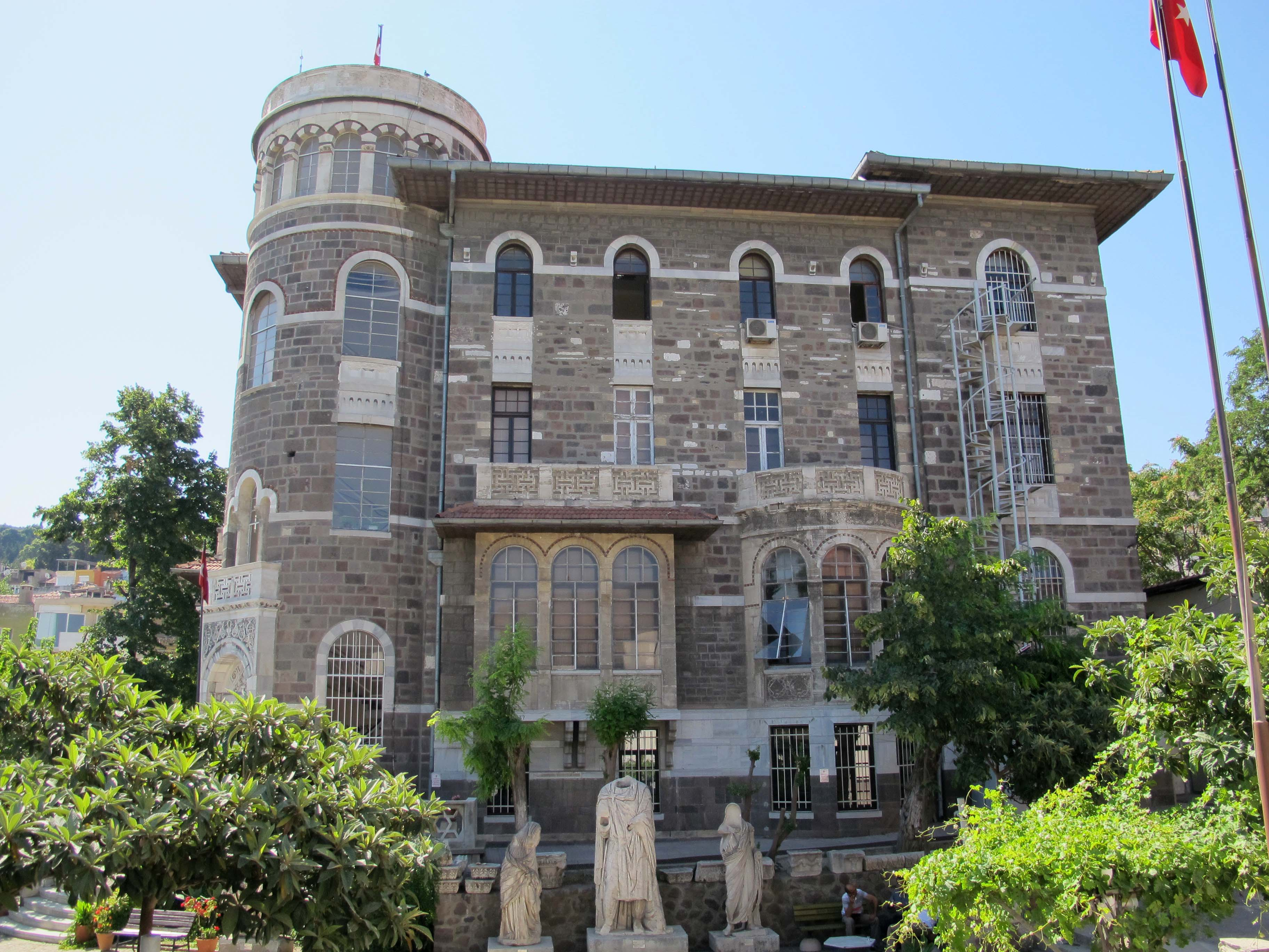 Izmir, museo etnografico, esterno